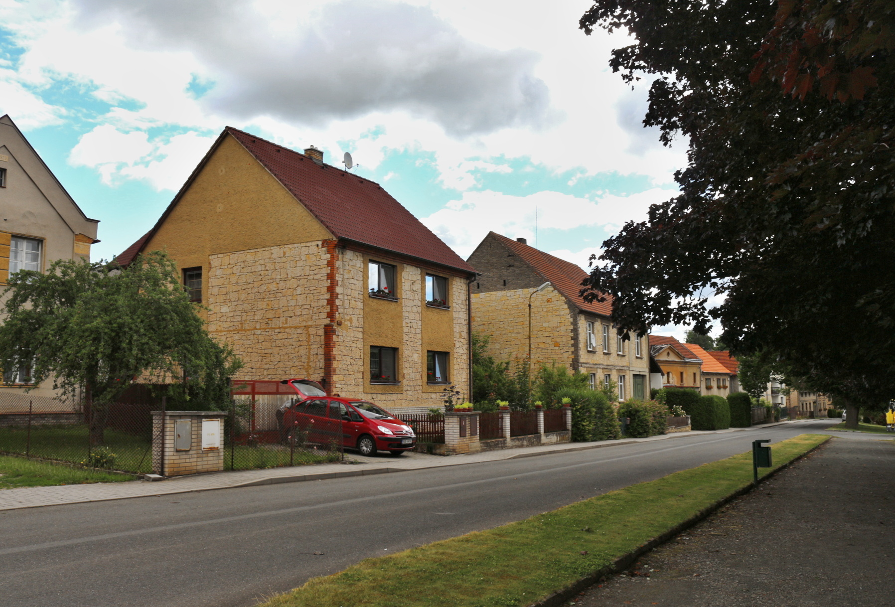 Hředle